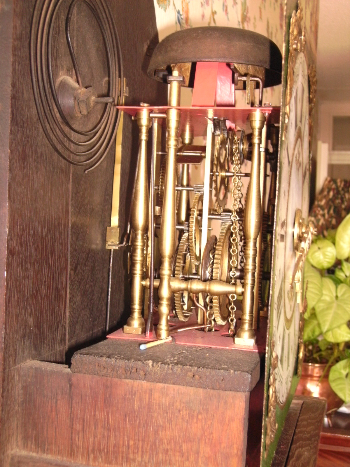 Zij aanzicht van een uurwerk van een Friese staartklok met gong en bel.